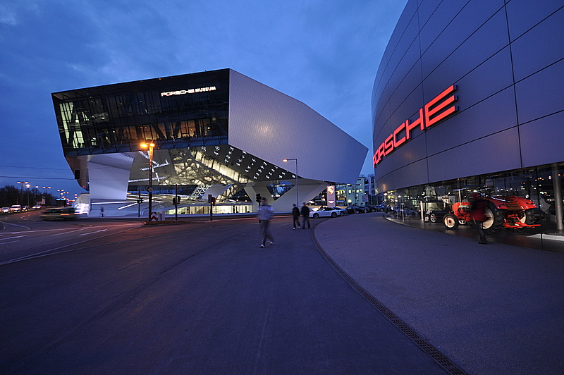 Neues Porsche Museum von Delugan/Meissl am frühen Morgen.